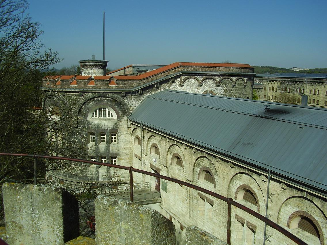 Die Wilhelmsburg in Ulm